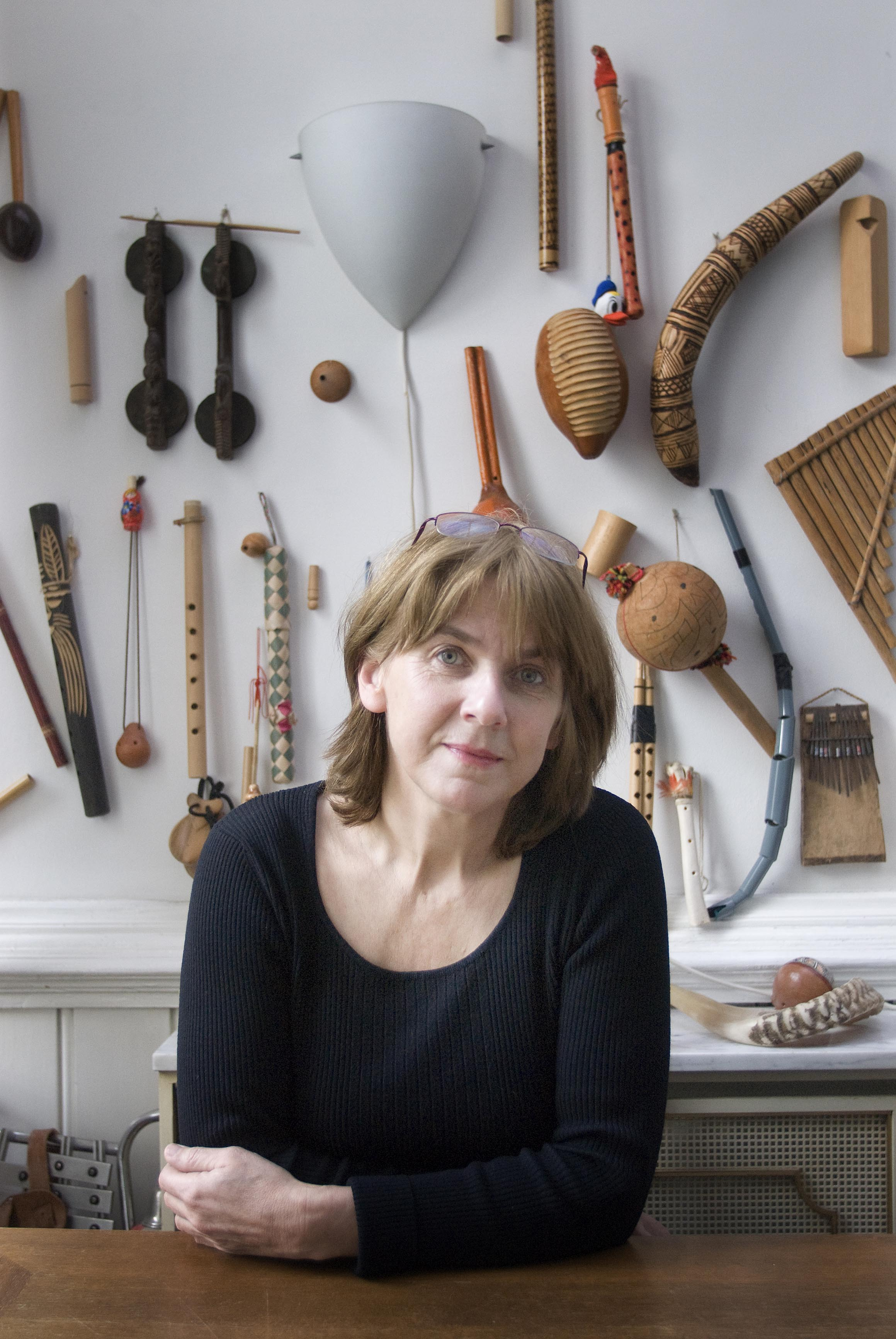 Joke van Leeuwen, schrijfster.